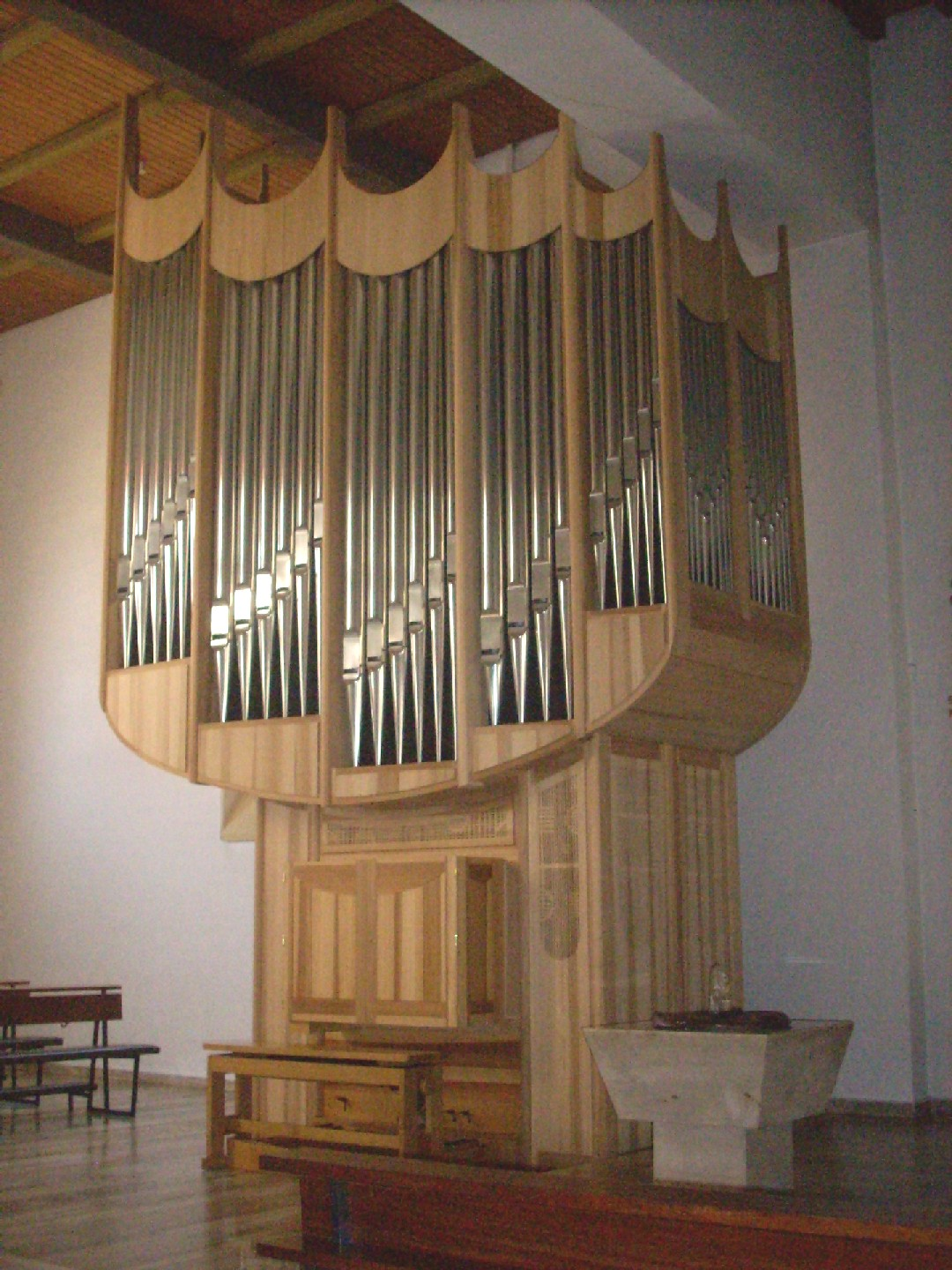 Burgdorf (Region Hannover), Kath. Kirche St. Nikolaus, Orgel